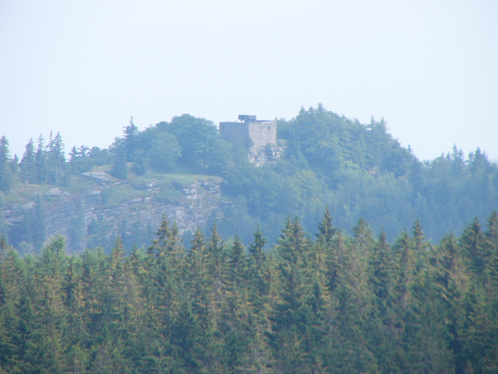 Hoher Stein, Felsformation auf dem Bergkopf (Waldsteinzug, Fichtelgebirge)